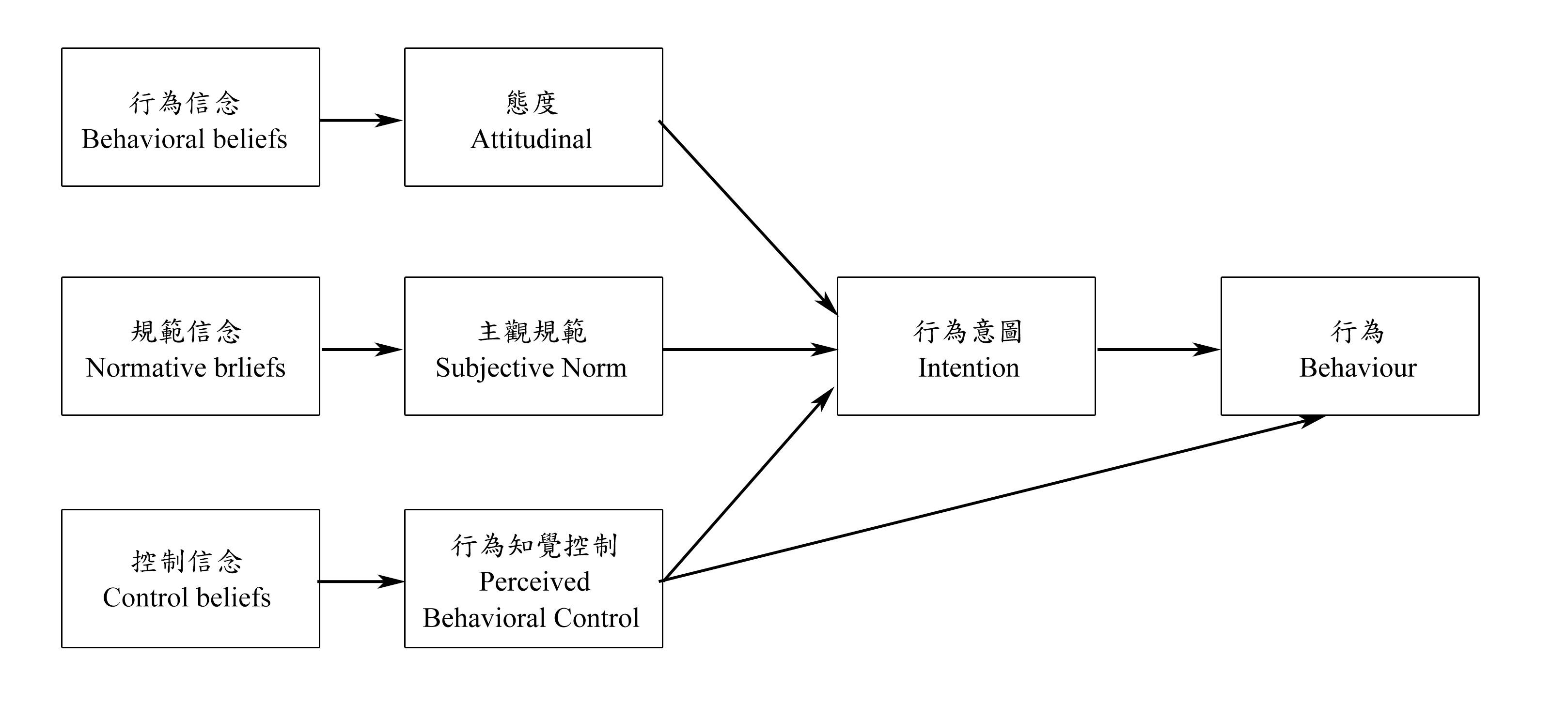 這是根據Ajzen於1991年提出的計畫行為理論所繪出的中文版本模型圖。